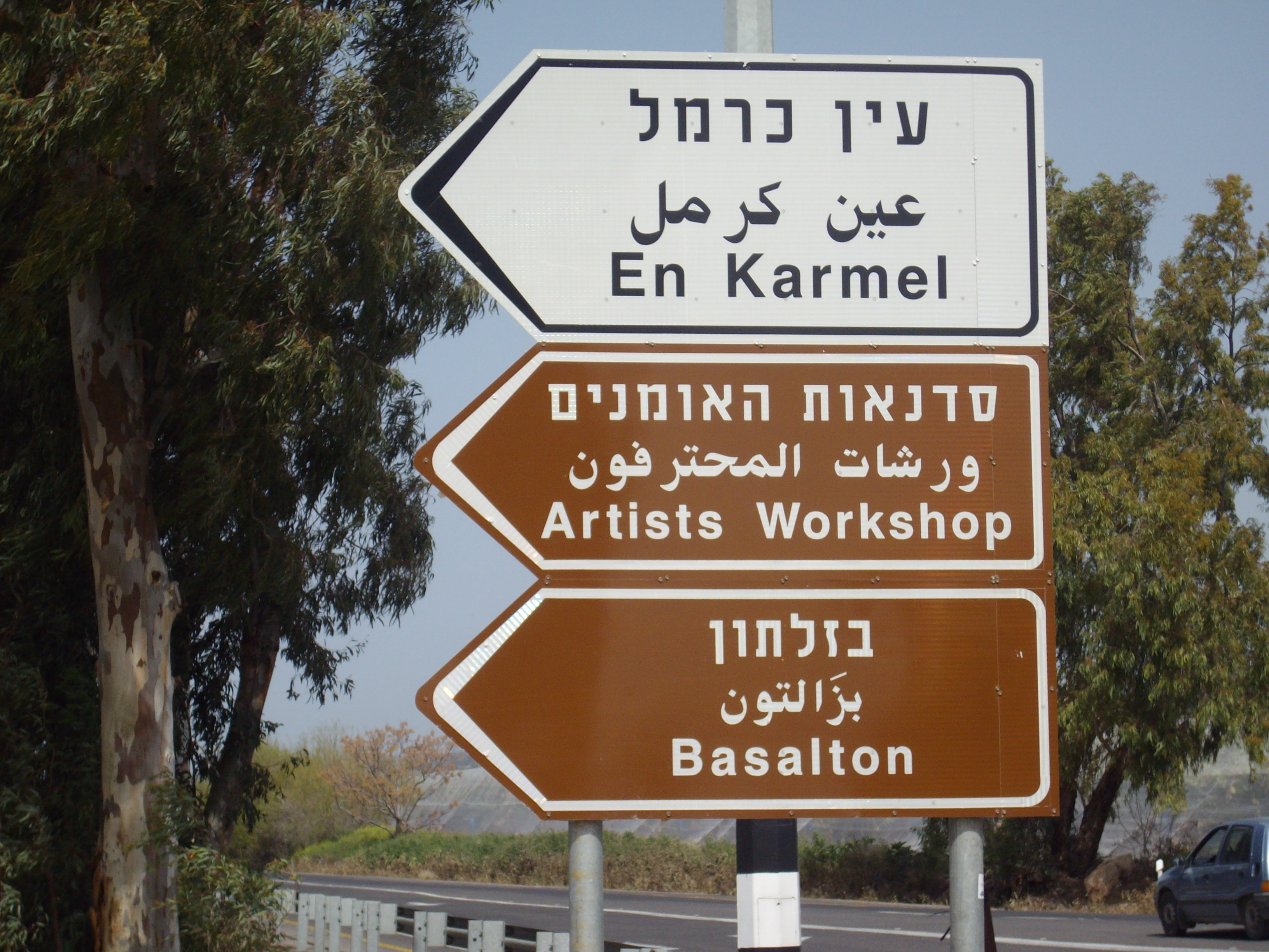 אתר "סדנאות האומנים" וגן פסלים ("בזלתון") נמצאים בשטח הקיבוץ